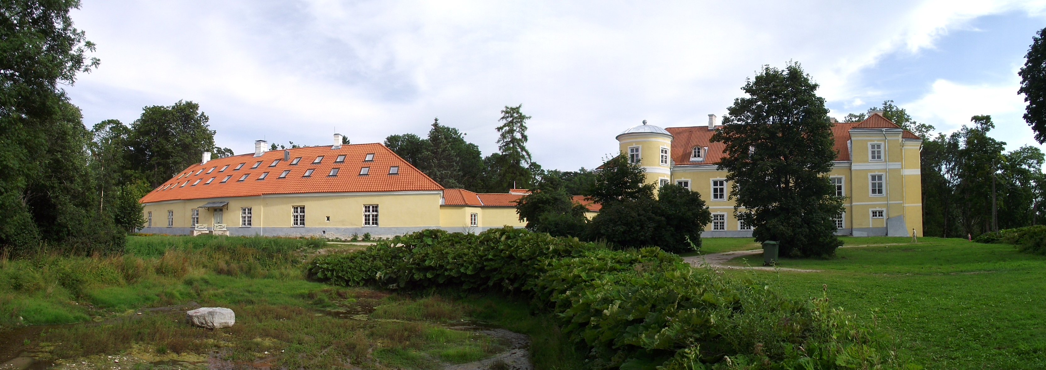 Kiltsi mõisa valitsejamaja ja peahoone